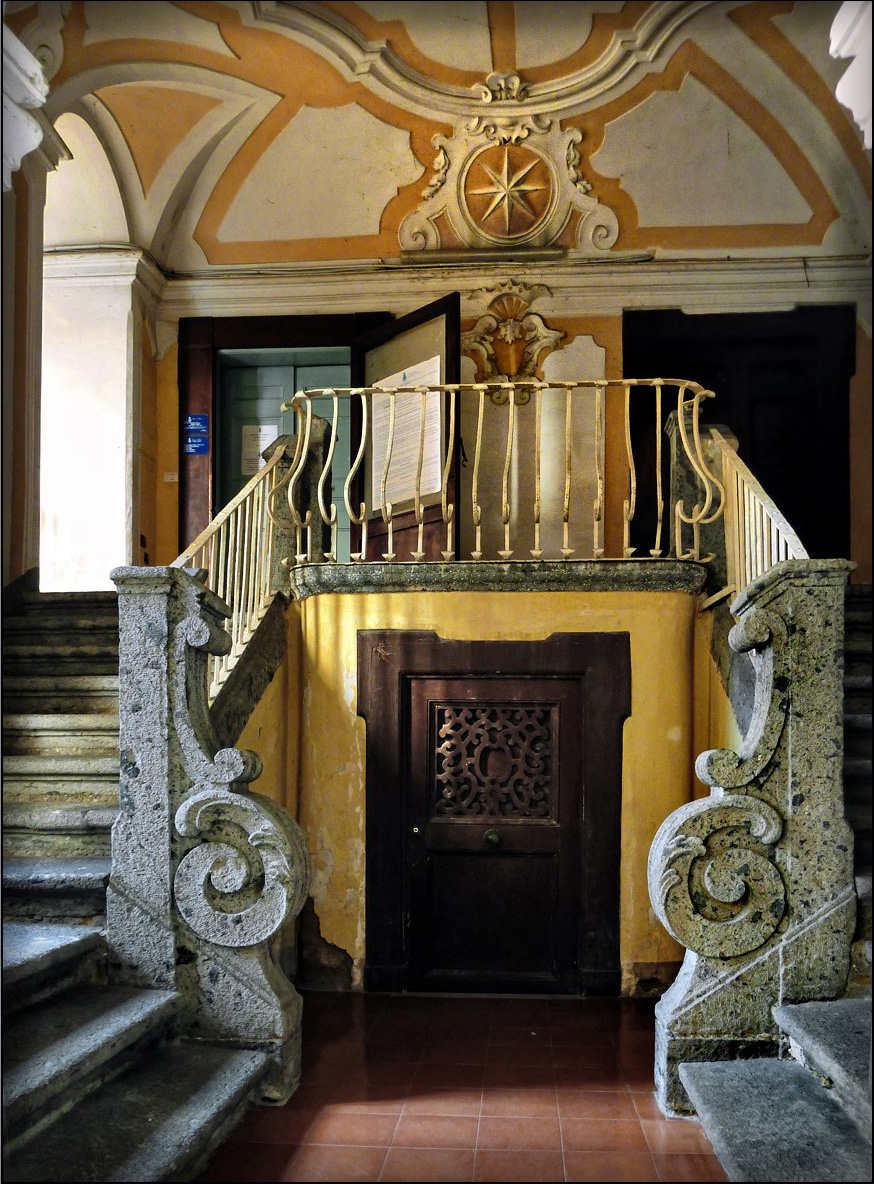 La scala di accesso (in piperno) al piano ammezzato di Villa Meola a Portici - Italia.